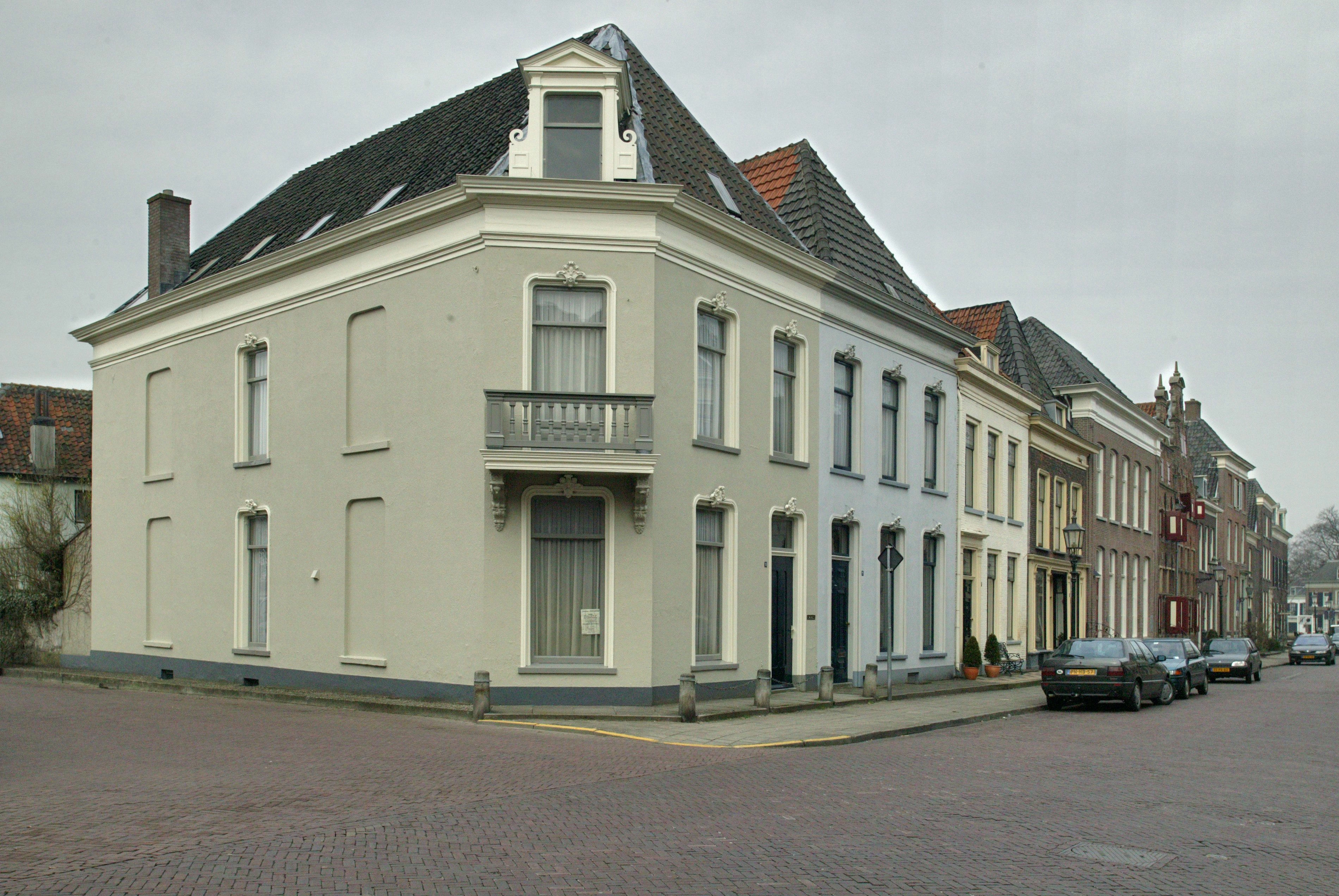 Straatbeeld, hoek Koepoortstraat-Korte Koepoortstraat